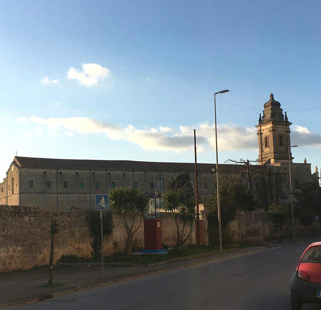 Santuario di Maria Santissima della Croce.